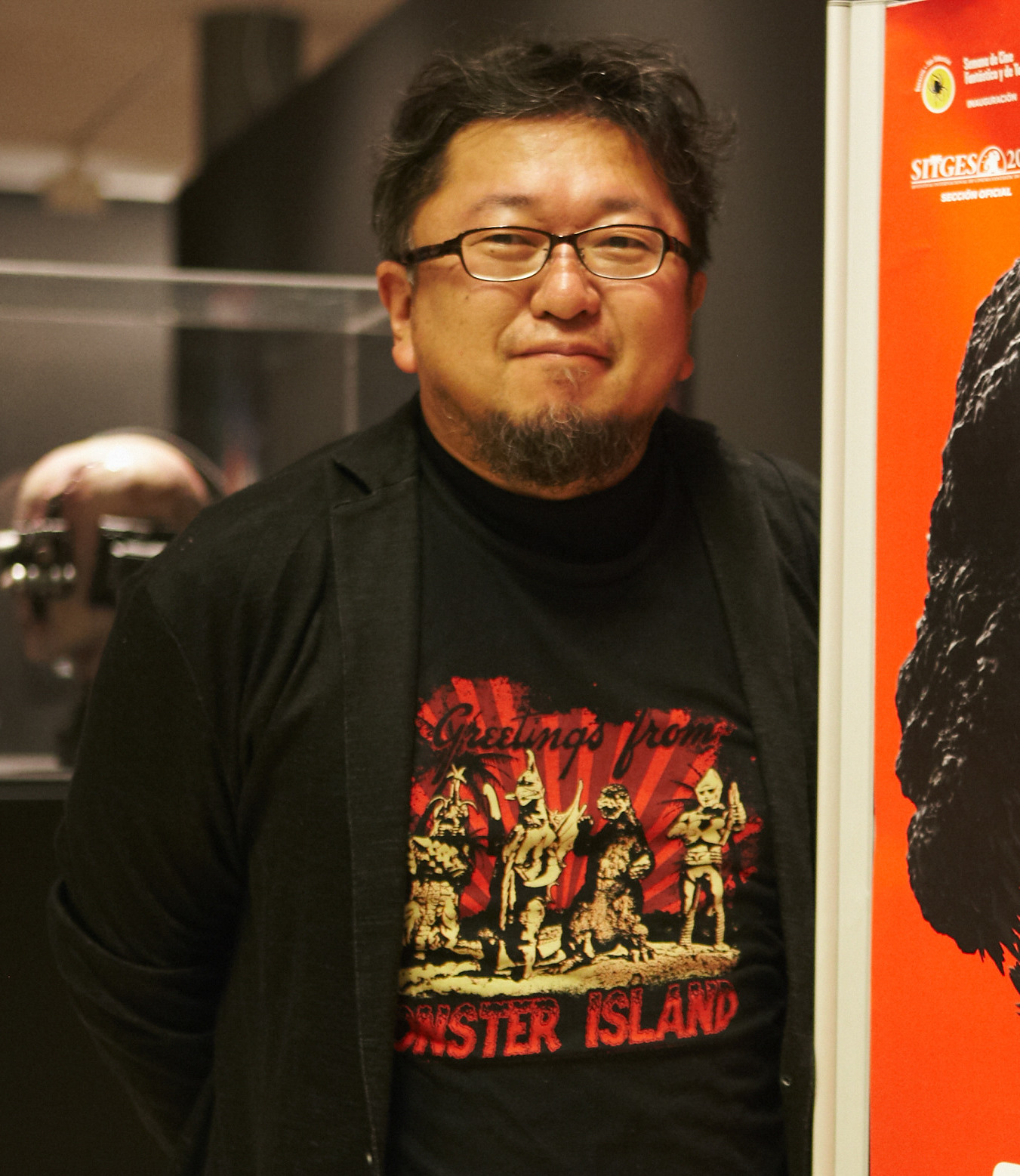 Argazkia / Fotografía: Floro Azqueta